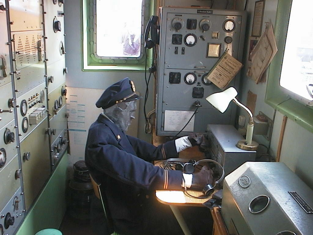 Tukholmaan museoidun majakkalaivan radiohytti ja radistinukke